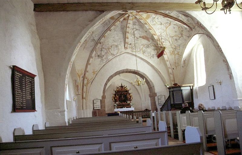 Lerup Kirke i Danmark. Skibet set mod øst